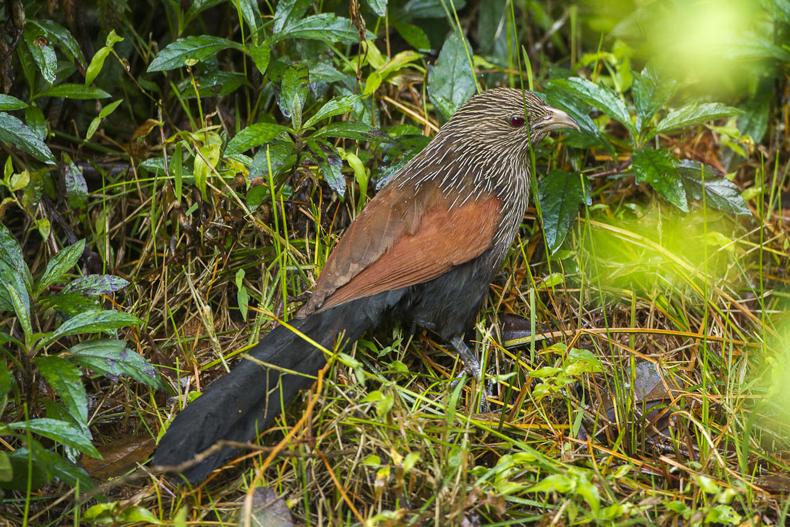 Madagascar Coucal - Andasibè - Madagascar_S4E7822